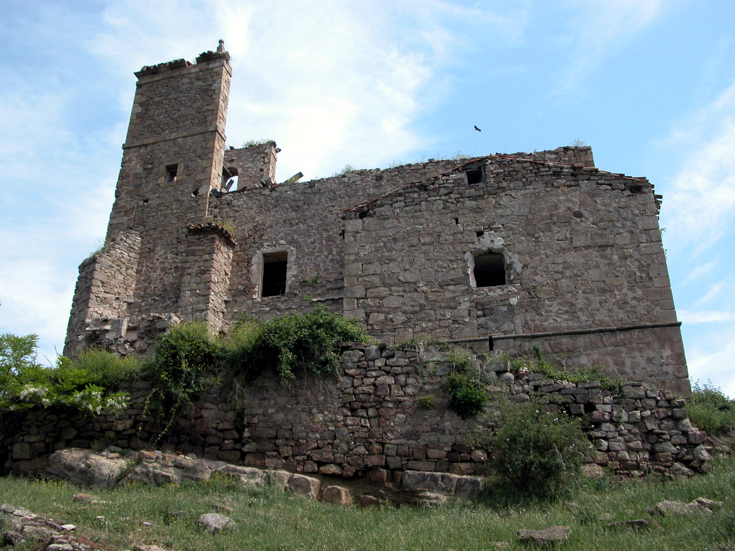 Ruinas de la iglesia de la Asunción en Santa María en Cameros, aldea despoblada de San Román de Cameros (La Rioja - España)